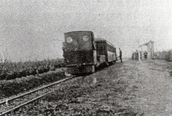 羽塚駅を出発する平坂線の貨客混合列車